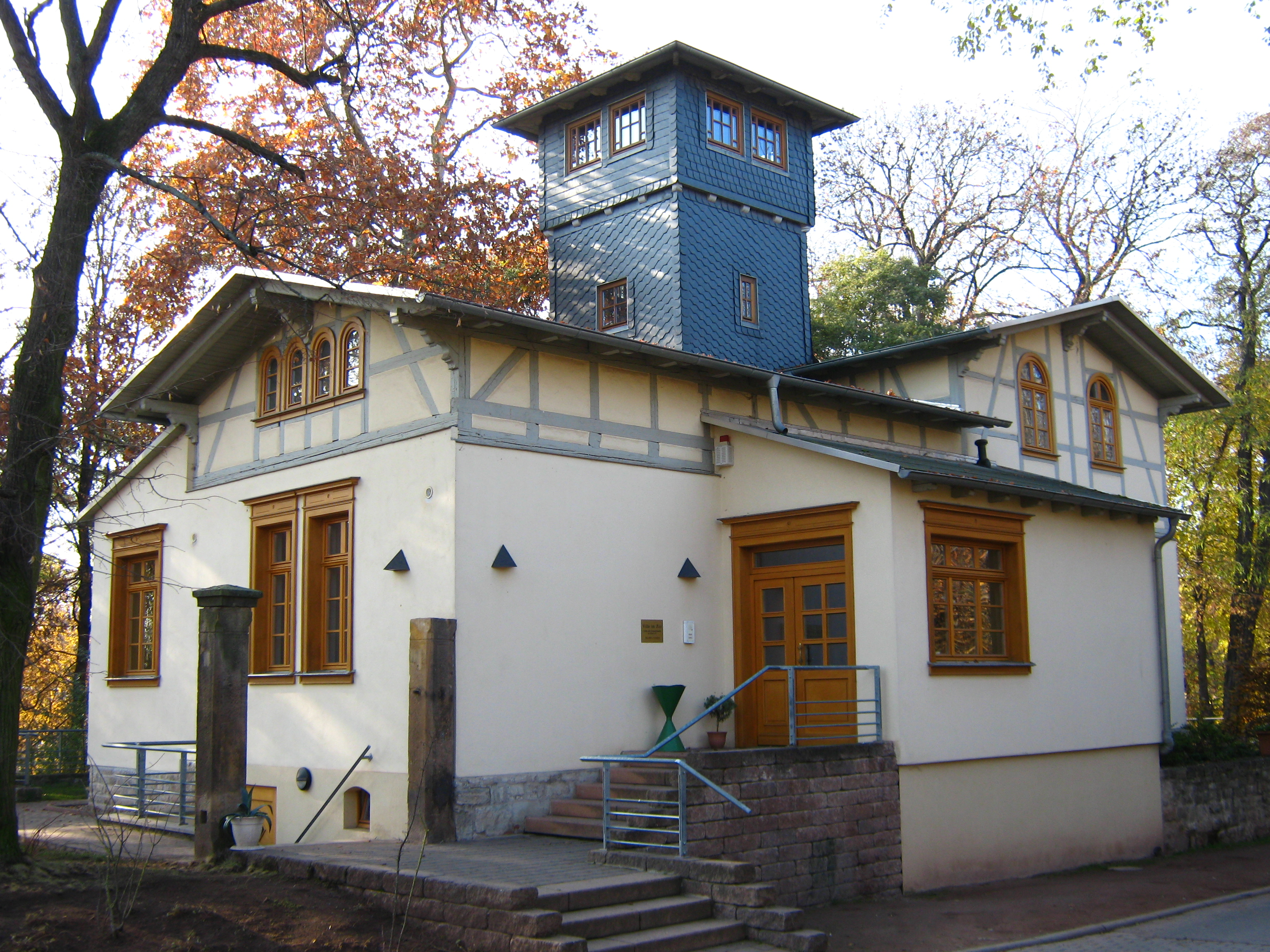 Die von Dr. Karl Axmann 1860 errichtete Villa am Roten Berg in Erfurt (Deutschland), heute Teil des Zooparks.